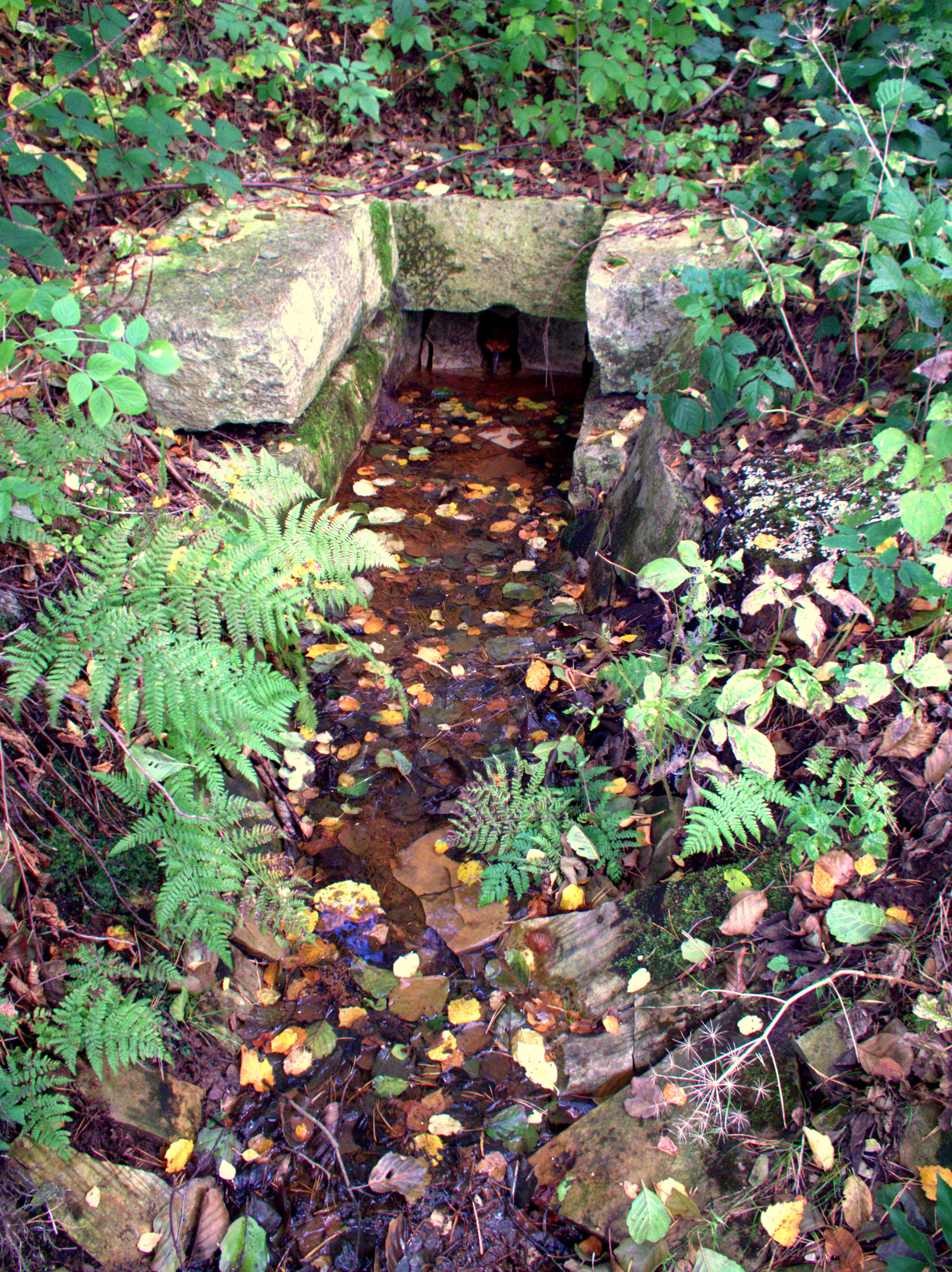 Die Quelle des Altmühl-Nebenflußes Sulz in Tyrolsberg (Gemeinde Berngau) bei Neumarkt